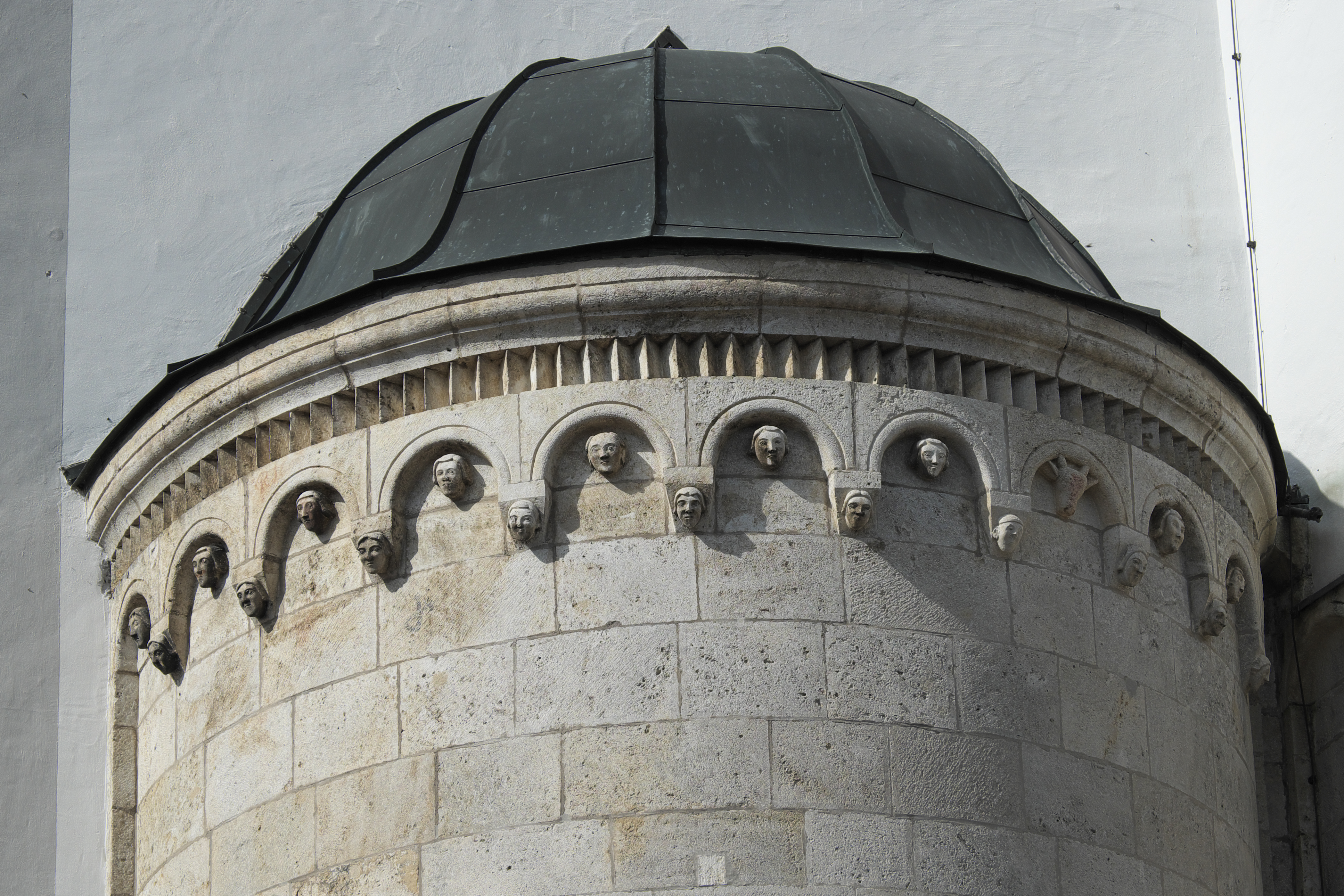 Wallfahrtskirche Heilig Kreuz, ehemalige Benediktinerinnenklosterkirche des Klosters Bergen in Bergen, einem Ortsteil von Neuburg an der Donau im Landkreis Neuburg-Schrobenhausen (Oberbayern/Bayern), Apsis mit Bogenfries und Kopfkonsolen